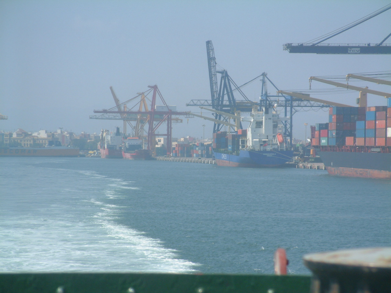 Port de València (Espanya)